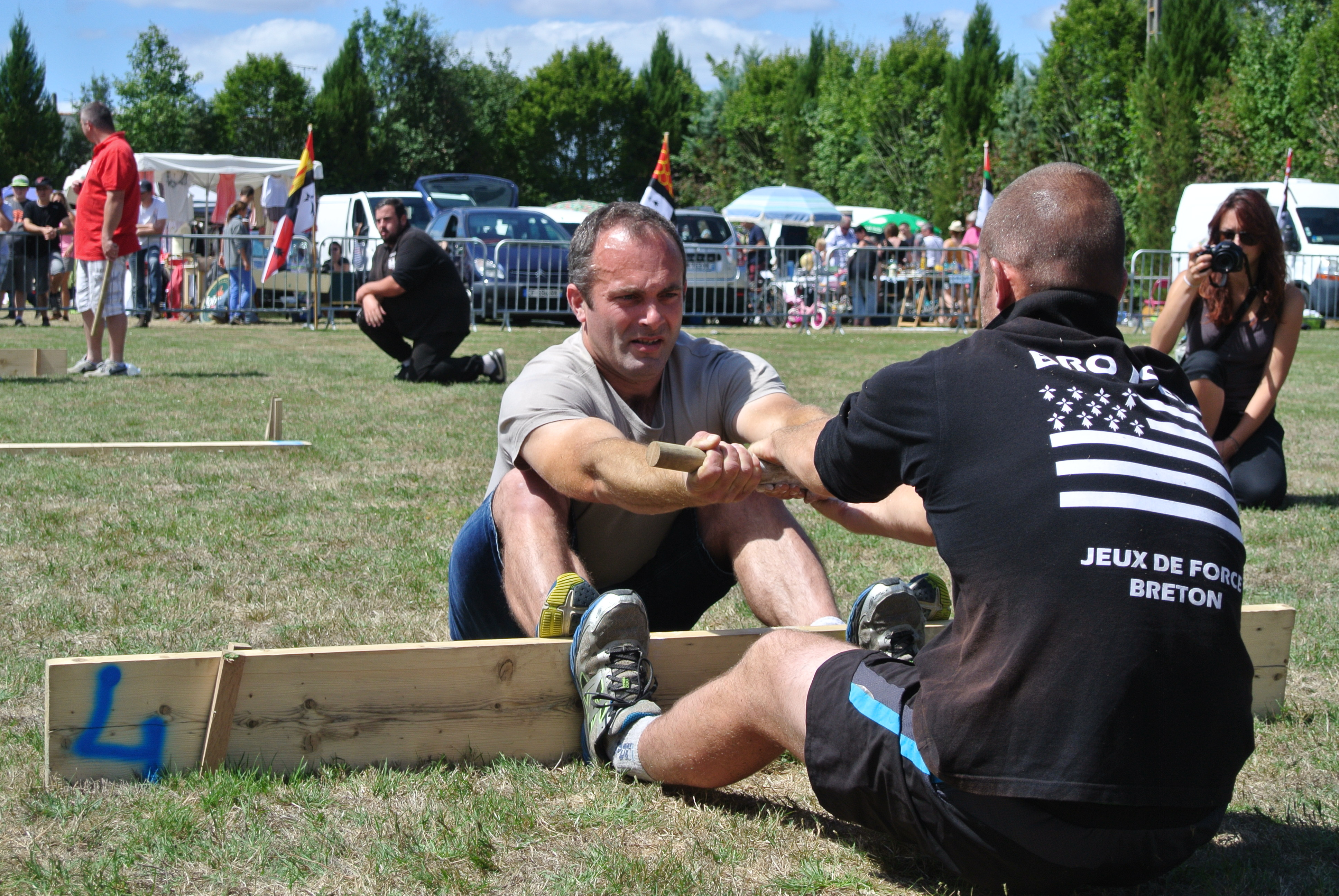 Bazh-Yod, Championnat de Bretagne de force bretonne 2017, à Saint-Omer-de-Blain, Loire-Atlantique